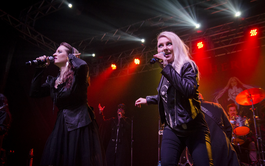 A Banda de Metal Sinfônico Therion apresenta-se em São Paulo, Brasil.